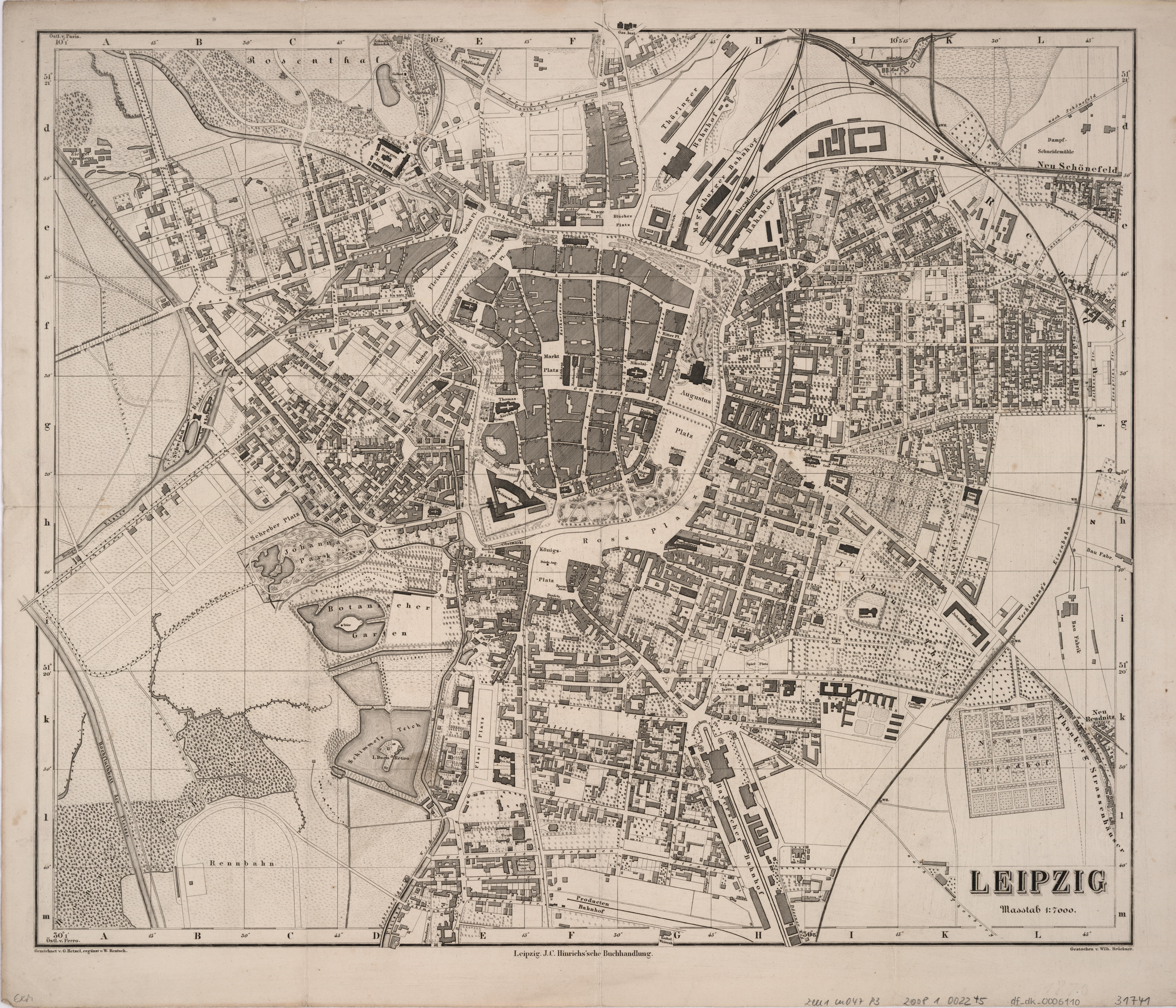 Stadtplan von Leipzig, 1:7 000, Stich, 1871; Leipzig / gezeichnet G. Hetzel, ergänzt v. W. Rentsch. Gestochen v. Wilh. Brückner. - 1:7 000. - Leipzig : Hinrichs, [nach 1871]. - 1 Kt. : Stich ; 47 x 40 cm, gefaltet